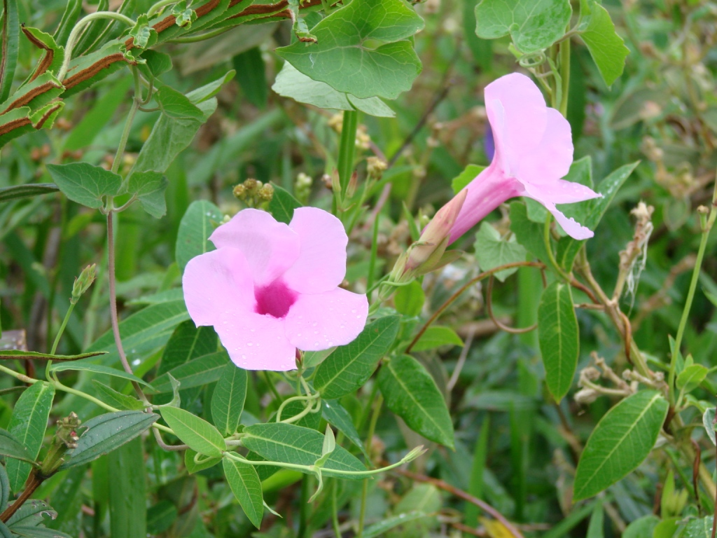 Rhabdadenia pohli - APOCYNACEAE - Praia do Sonho - Palho�a - SC - Brasil